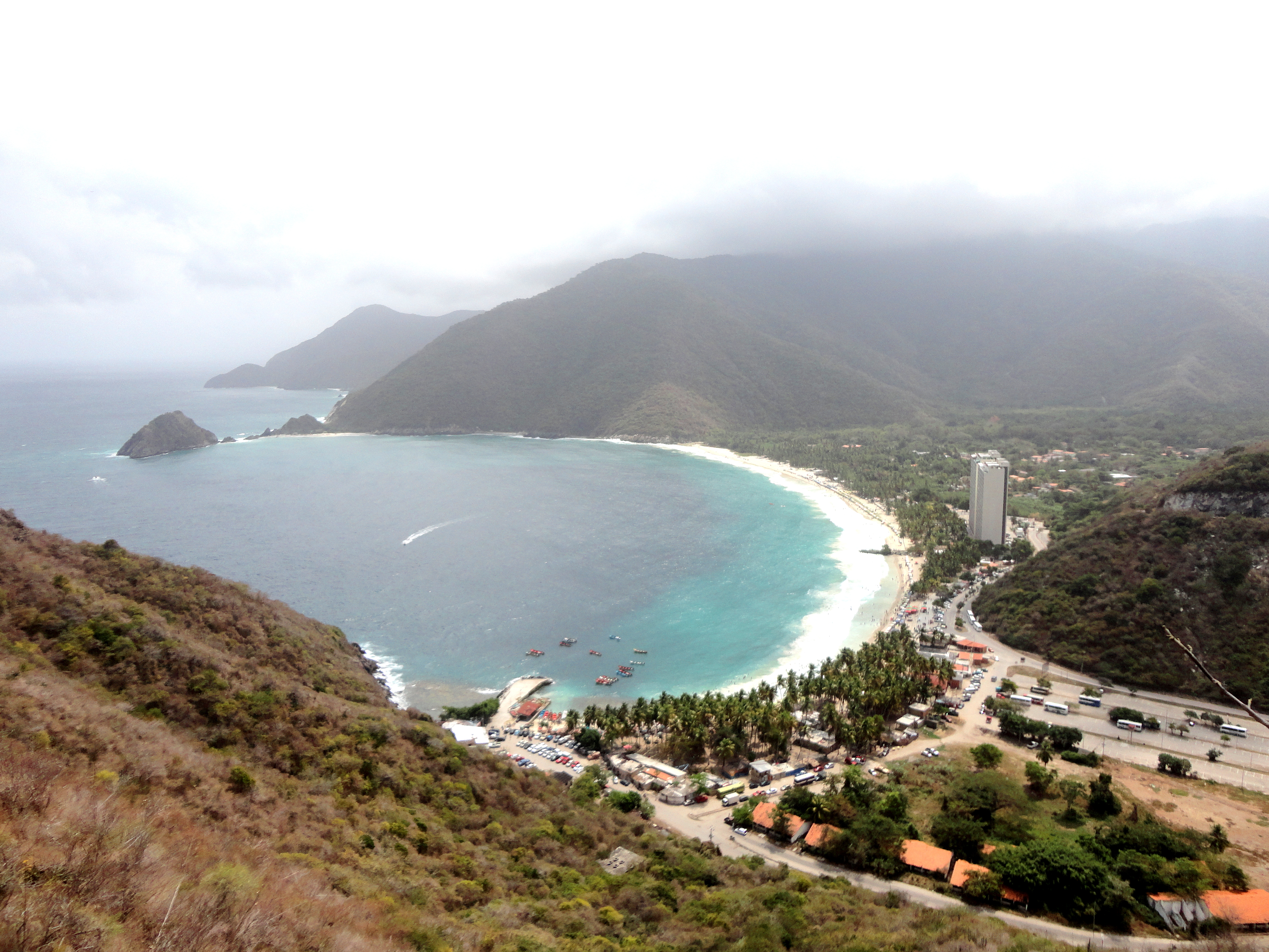 Playa, ubicada en Ocumare de la Costa de Oro, estado Aragua Venezuela.